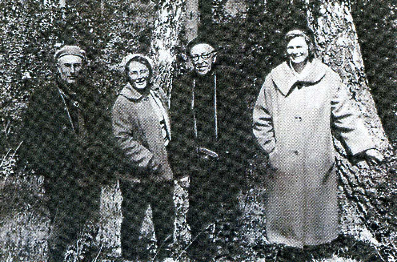 С.Я Соколов и др.